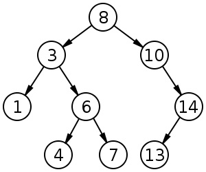 Primjer binarnog stabla